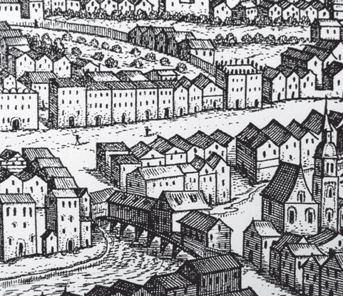 Innbrücke, Ausschnitt aus der Ansicht von Schwaz in der Topographia Provinciarum Austriacarum, Austriae, Styriae, Carinthiae, Carniolae, Tyrolis etc.